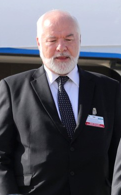 Чрезвычайный и полномочный посол Российской Федерации в Туркменистане Александр Блохин во время встречи Президента России Владимира Путина в аэропорту Ашхабада